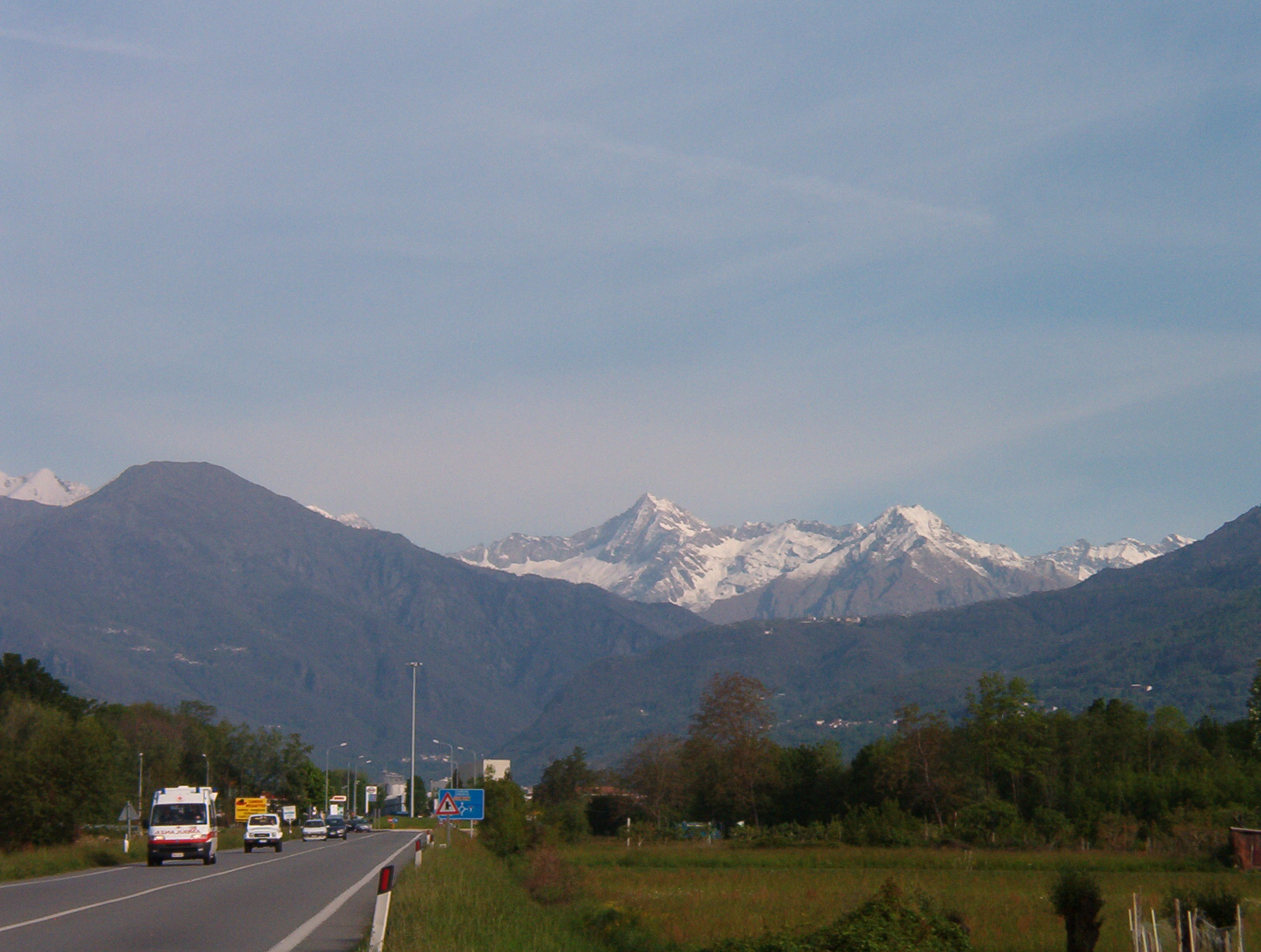 Punta Lavina - massiccio del Gran Paradiso - Alpi Graie- Italia